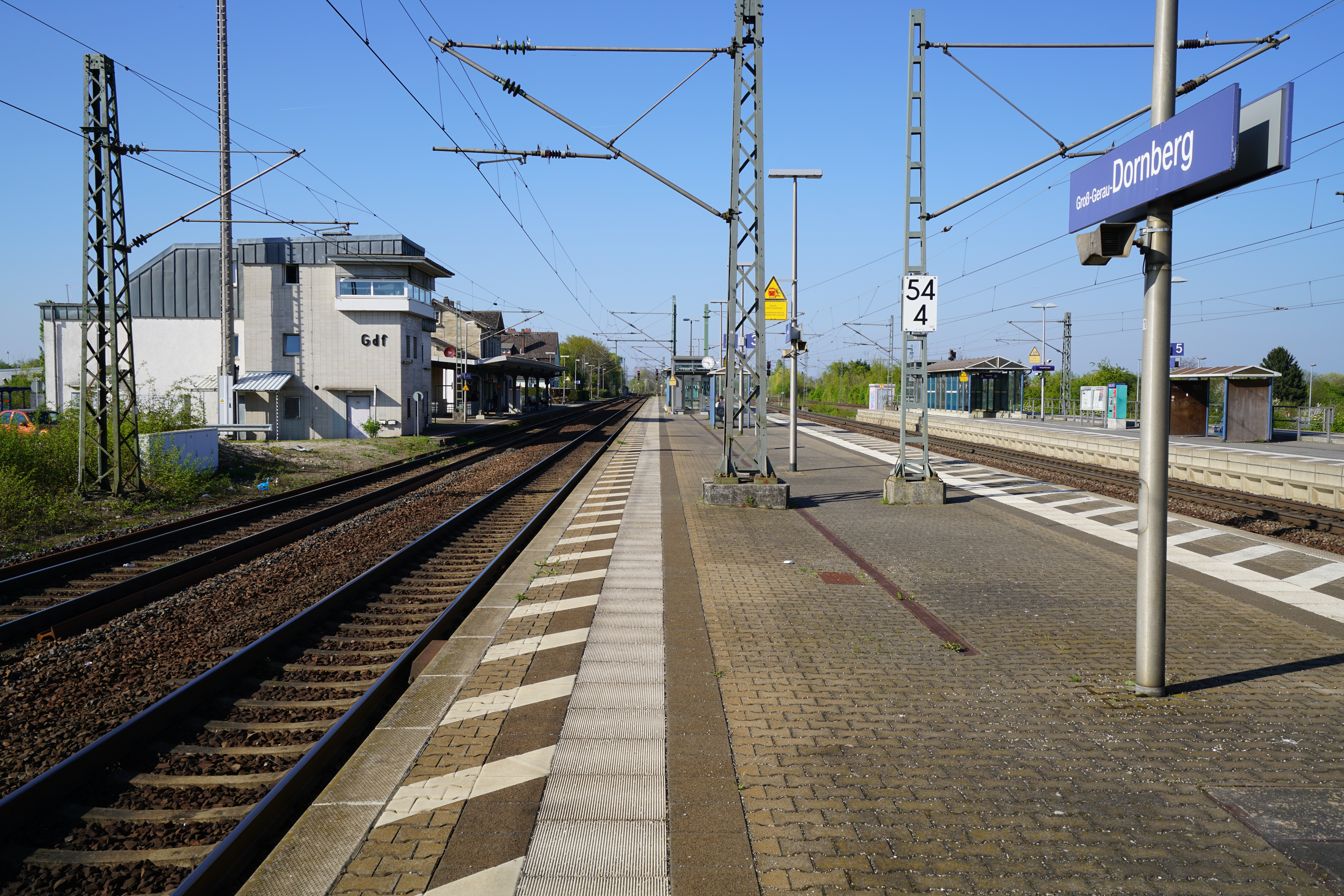 Die Bahnsteige des Bahnhofs Groß Gerau-Dornberg der Stadt Groß-Gerau in Hessen in Deutschland